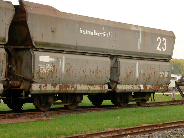 Waggon der Preussen Elektra im Braunkohlemuseum Borken